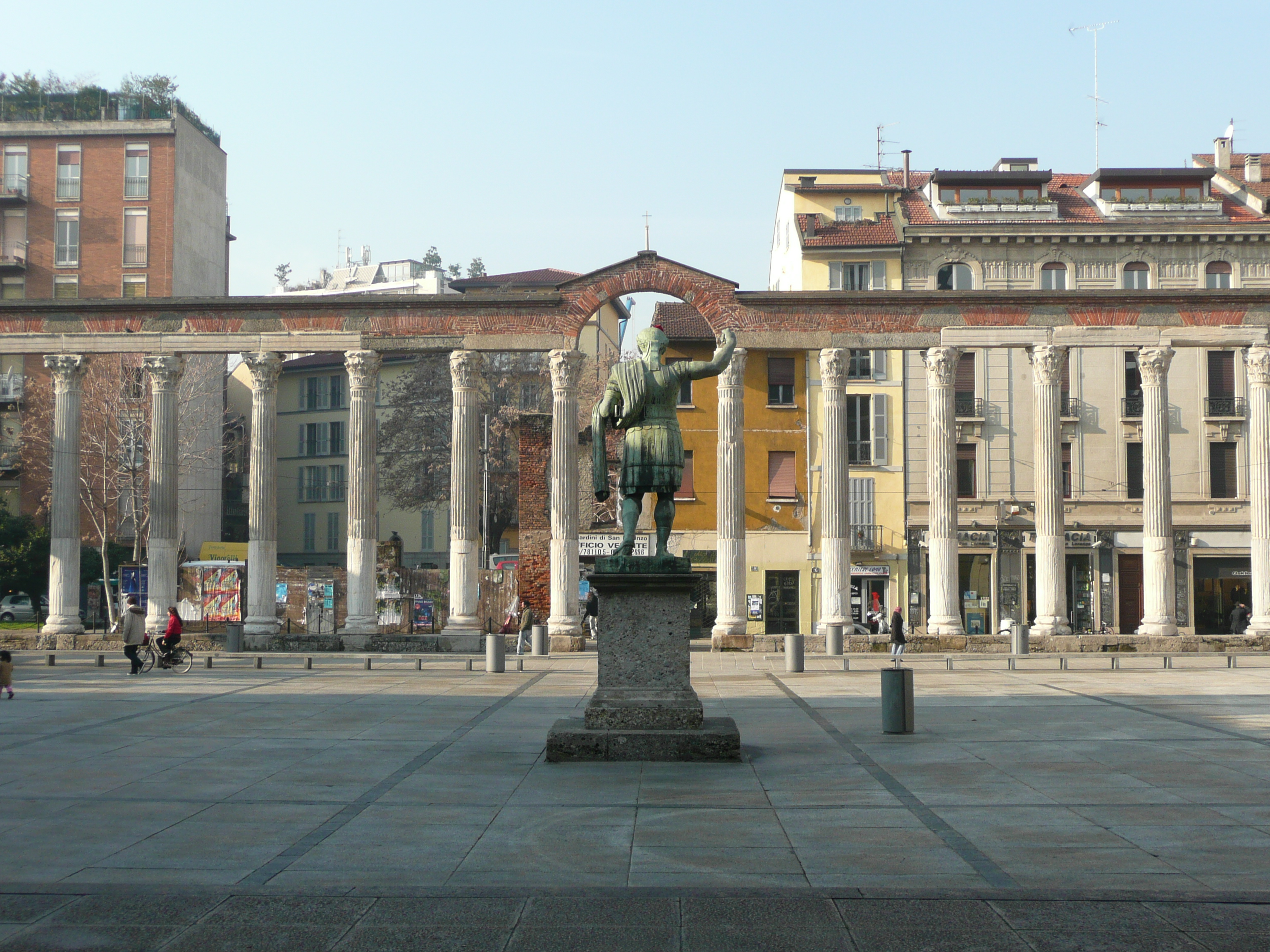 Roman Columns, San Lorenzo Maggiore in Milan